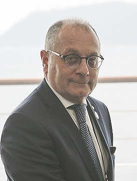 El canciller argentino, Jorge Faurie, mantuvo una reunión bilateral con su par de Corea del Sur, la ministra de Relaciones Exteriores, Kang Kyung-wha, en el marco del Foro de Cooperación América Latina-Asia del Este (FOCALAE) que se lleva a cabo en la ciudad coreana de Busan.